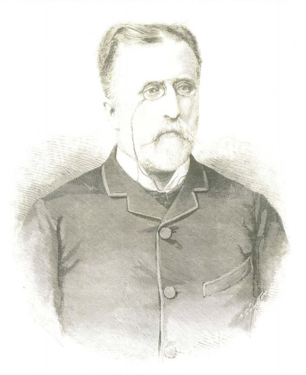 Excmo. Sr. D. Narciso de Salabert y Pinedo, Marqués de la Torrecilla, Senador del Reino. Nació en París en 1830. Falleció en la misma capital el 5 del corriente.